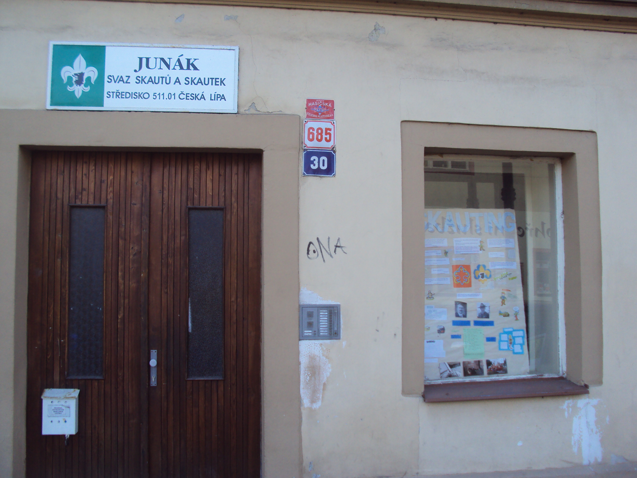 Klubobna Junáka v Ceské Lípě, Moskevská 685, středisko Řetěz